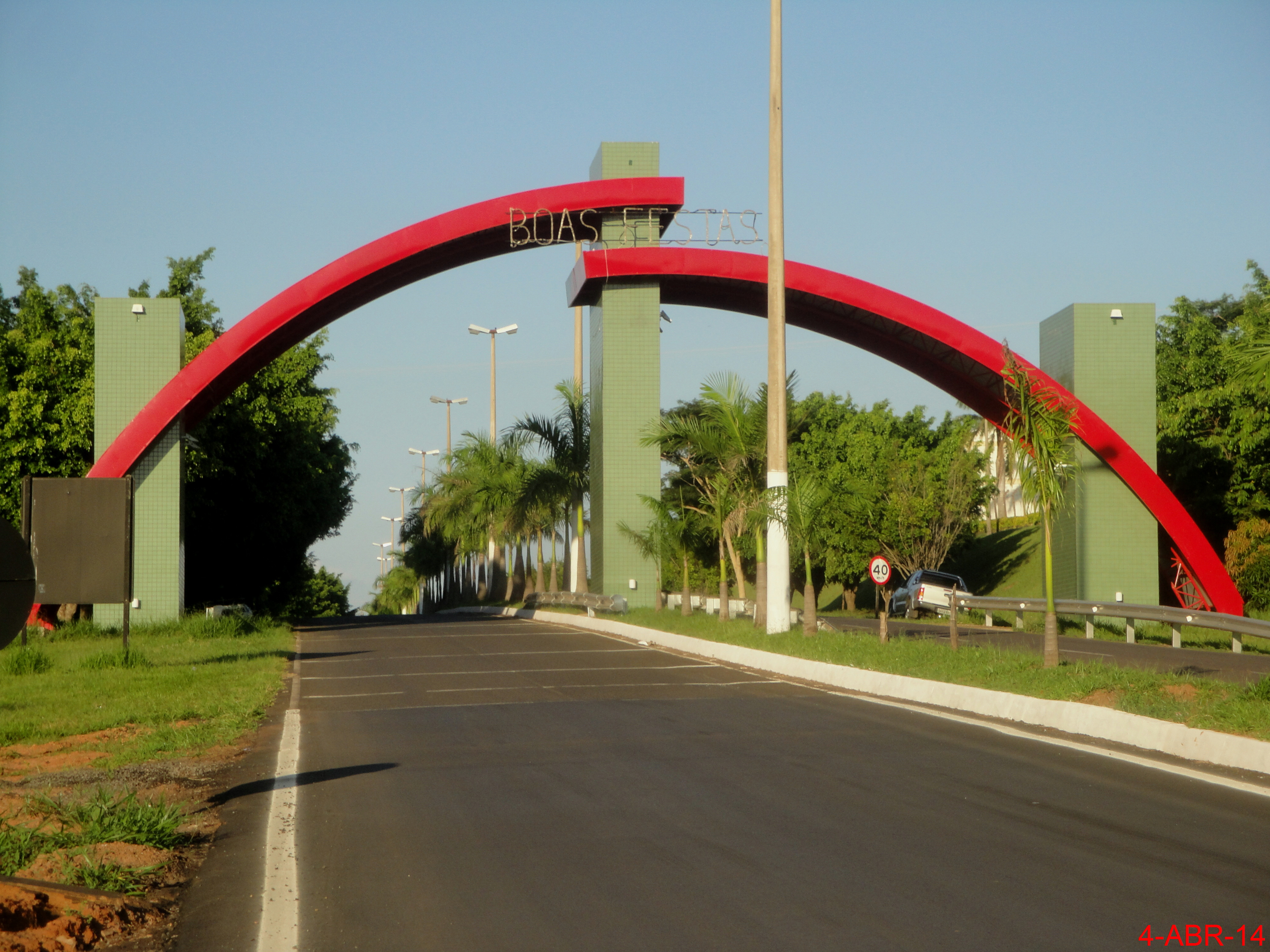 Portal na entrada da cidade de Santa Adélia.